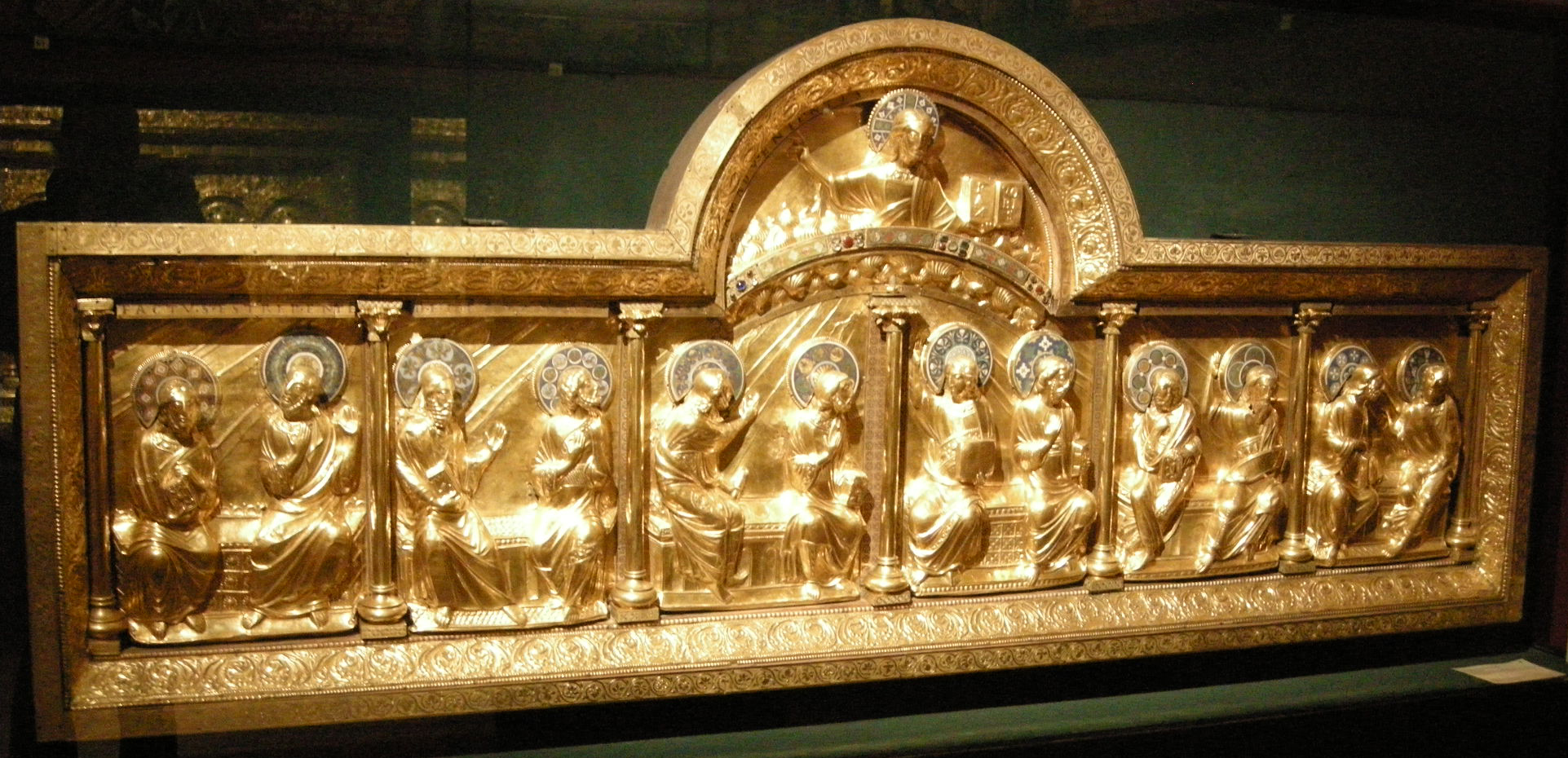 Retablo dall'abbazia di stavelot, regione della mosa, 1160-1170